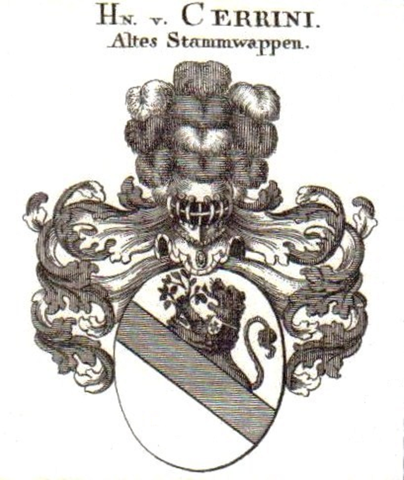 Stammwappen der Cerrini de Monte Varchi, altadeliges toskanisch-florentinisches Geschlecht mit einer seit 1671 österreichischer (seit 1789 freiherrlicher, seit 1838 gräflicher) und einer daraus abgezweigten, seit 1719 sächsischer (auch freiherrlicher) Linie